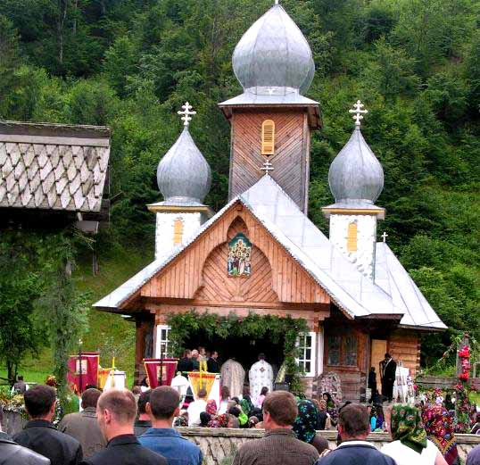 biserica de pe sus